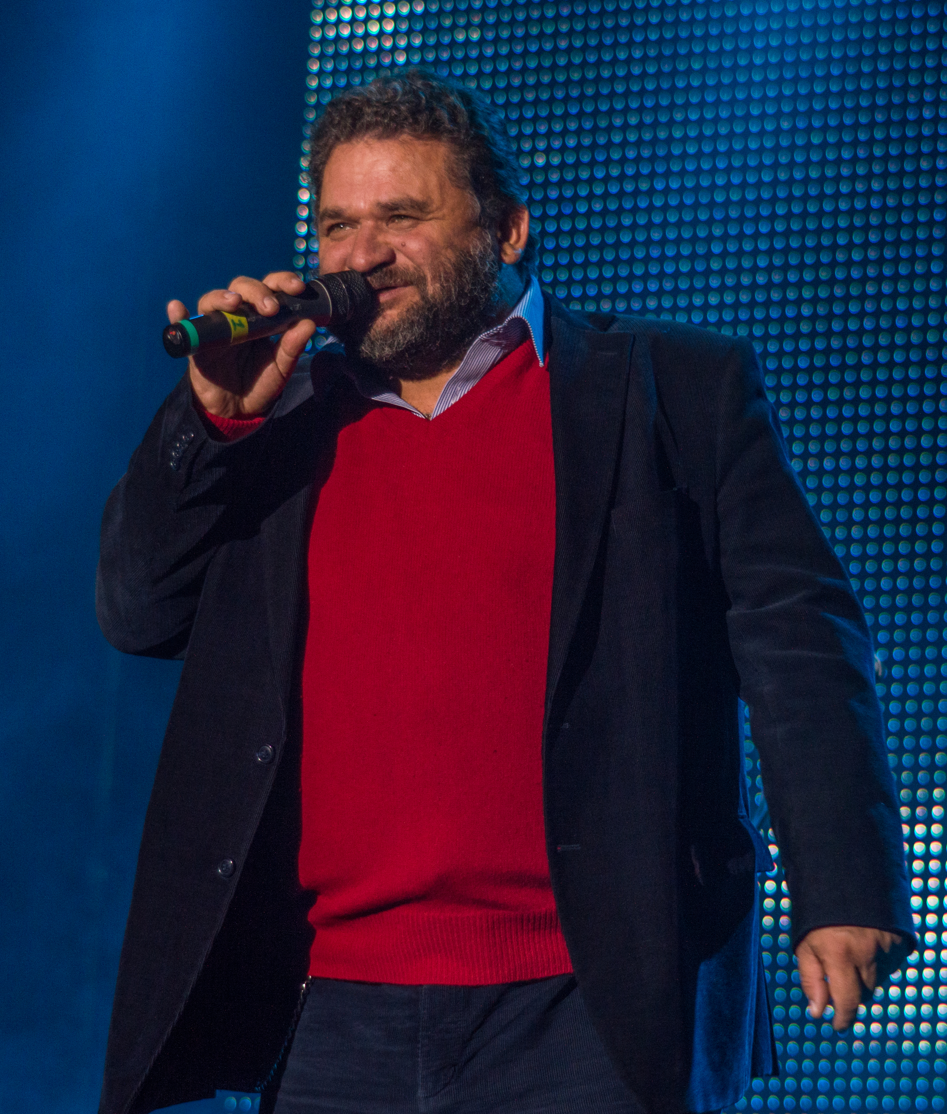 Чигляев Валерий Иванович ведущий концерта в Херсоне 20 октября 2013 года